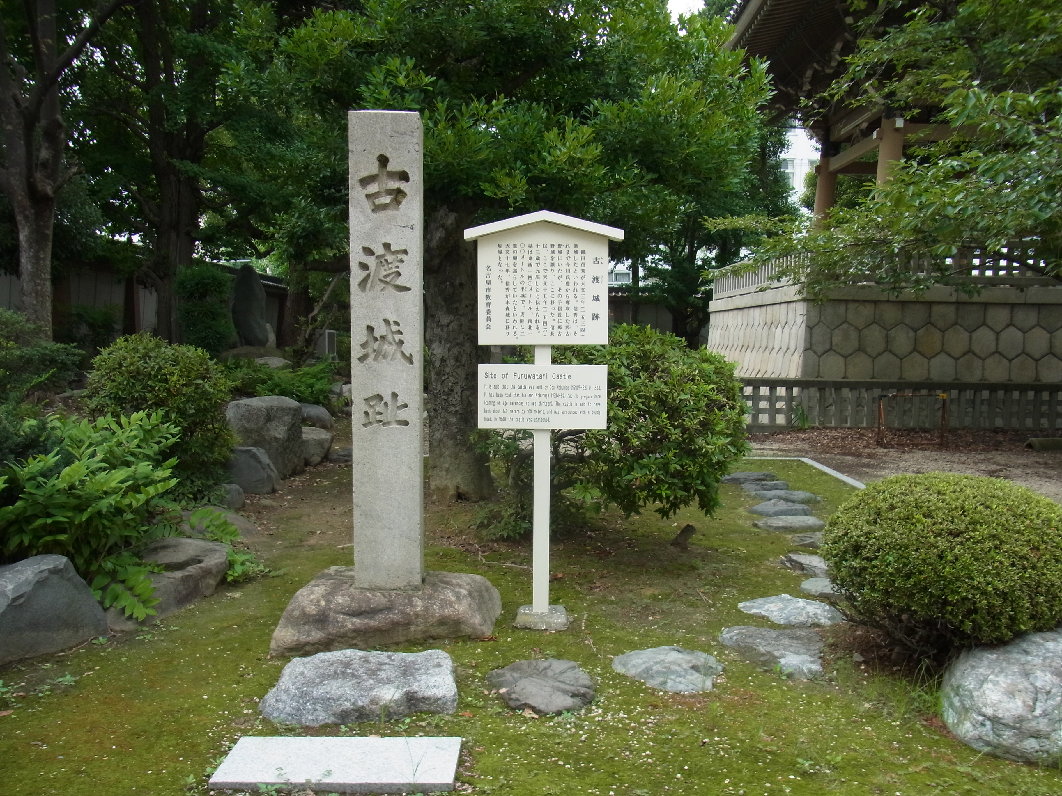 古渡城跡石碑